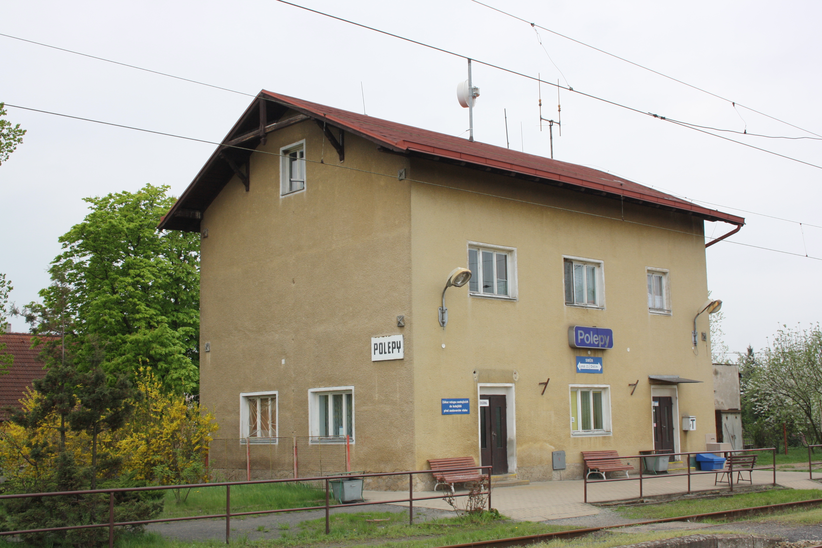 Staniční budova v Polepech v okrese Litoměřice.